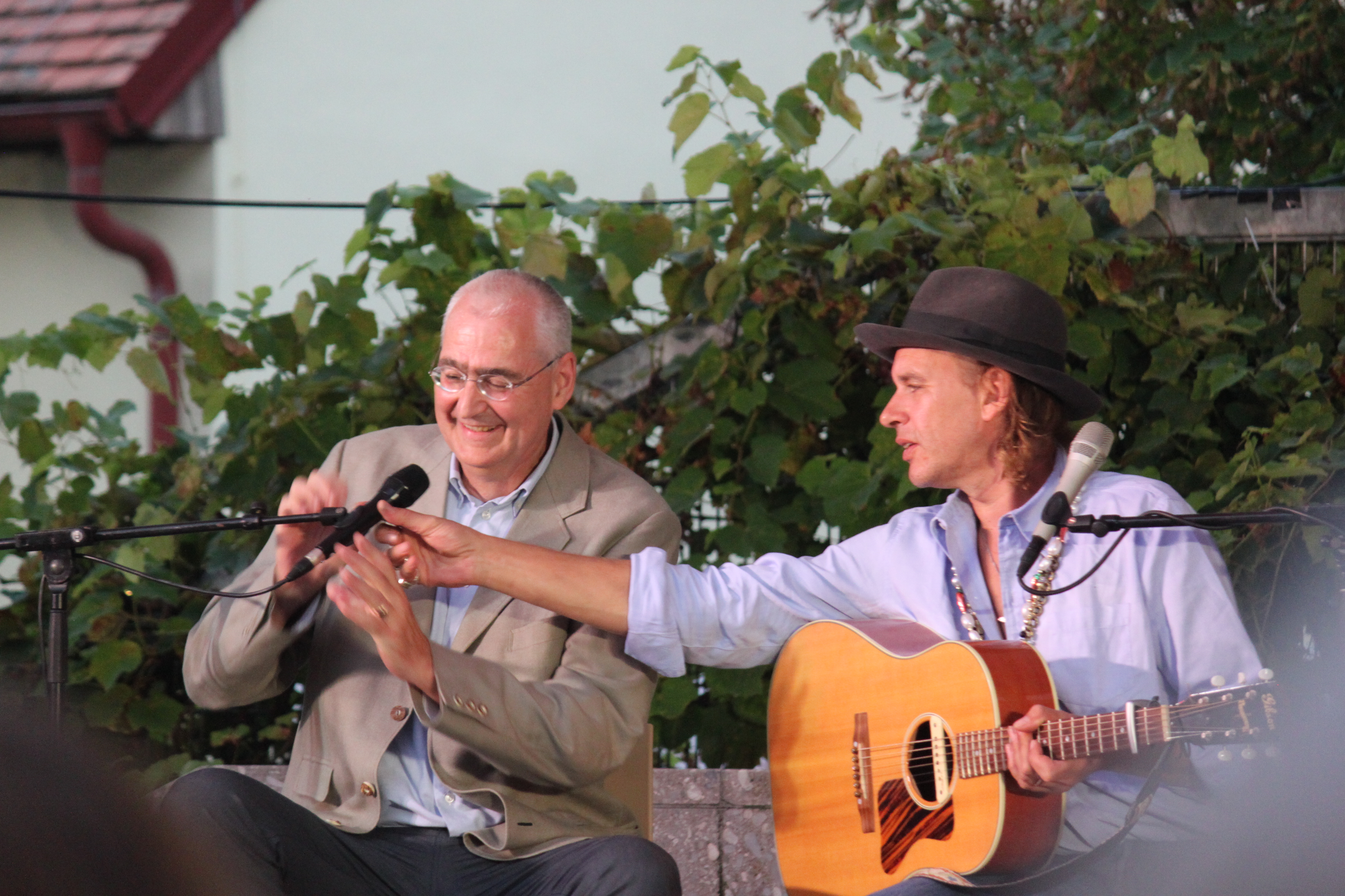 Carl Manzano, Nationalparkdirektor, mit Ernst Molden